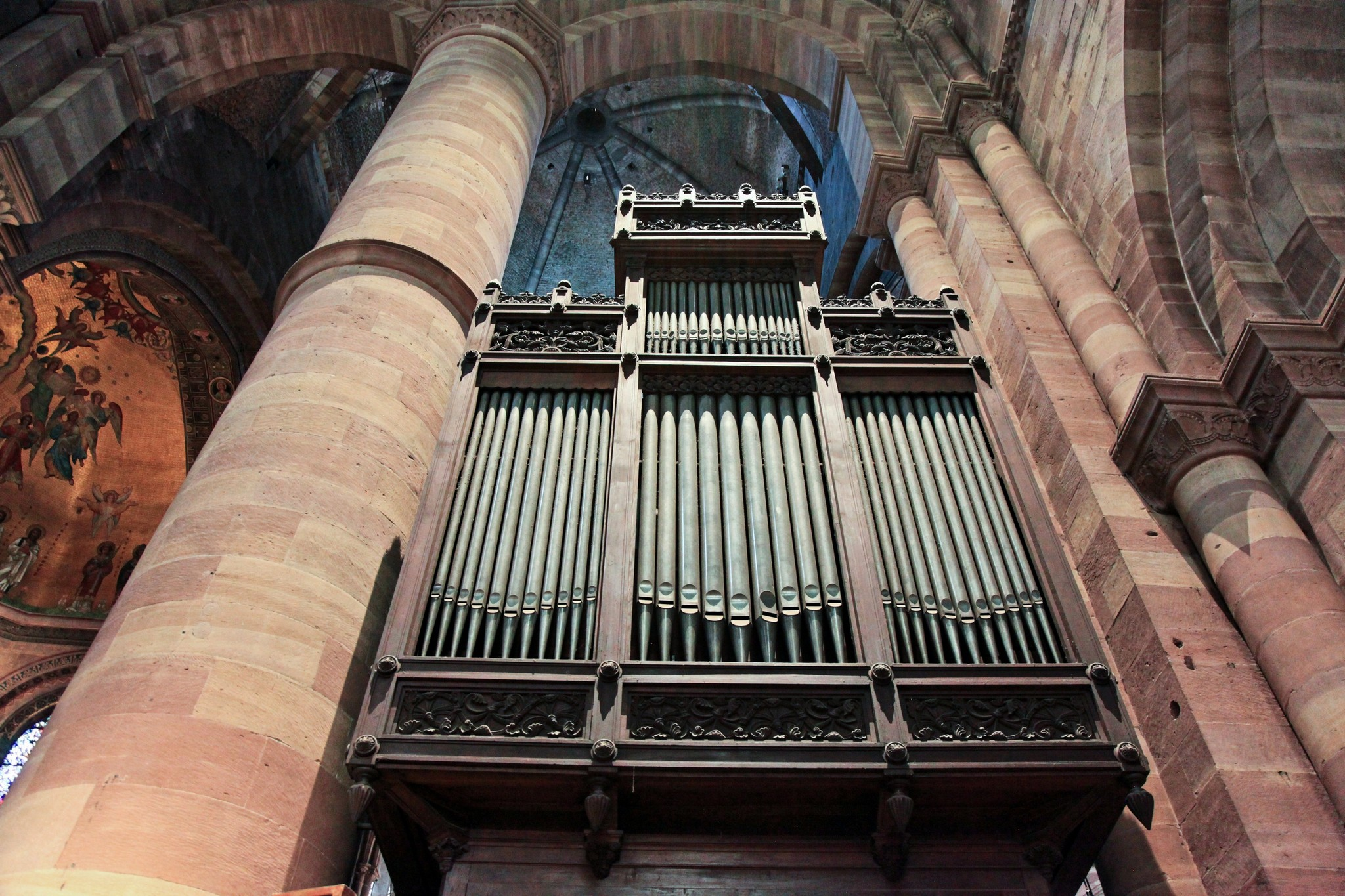 L'orgue